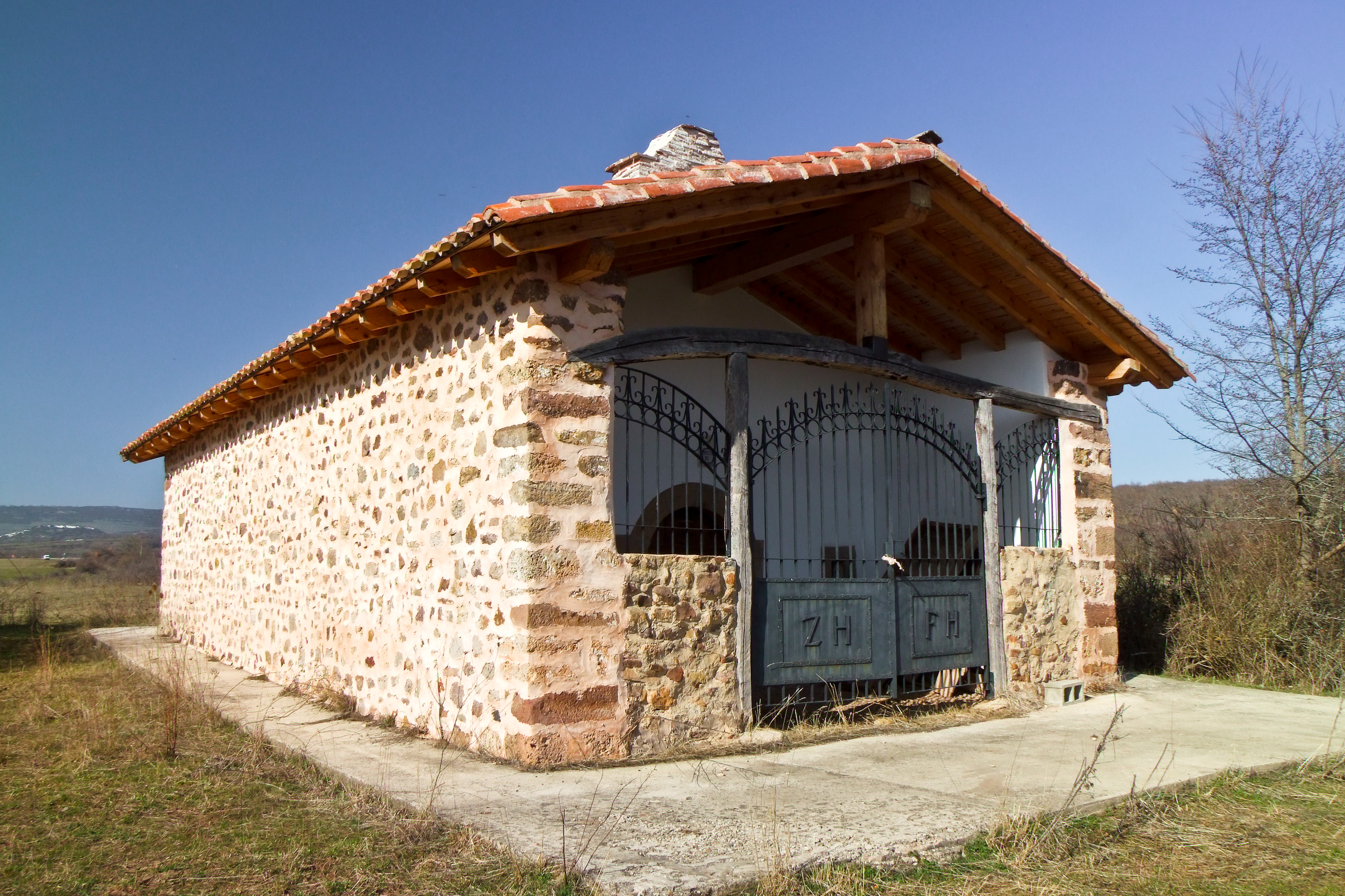 Ermita de Santa María en la localidad de Montemediano, La Rioja - España